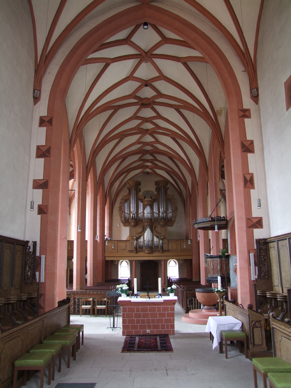 Simultankirche Bechtolsheim, Blick vom Chor ins Langhaus